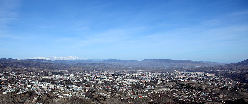 Панорама Степанакерта